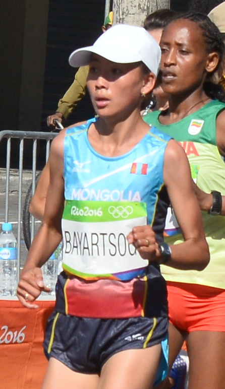 Passage du marathon des jeux olympiques de Rio 2016 dans le centre de Rio